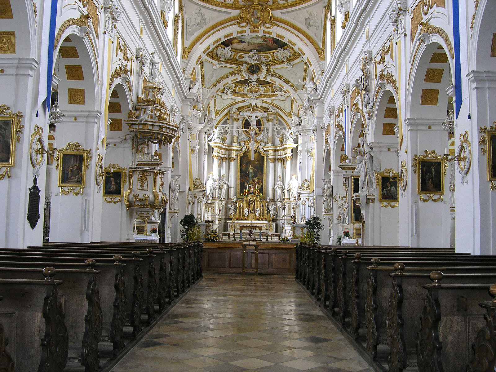 Klosterkirche Oberelchingen. Blick vom Eingang auf den Chor The monastery church of Oberelchingen. The interior Date: 2006-04-18